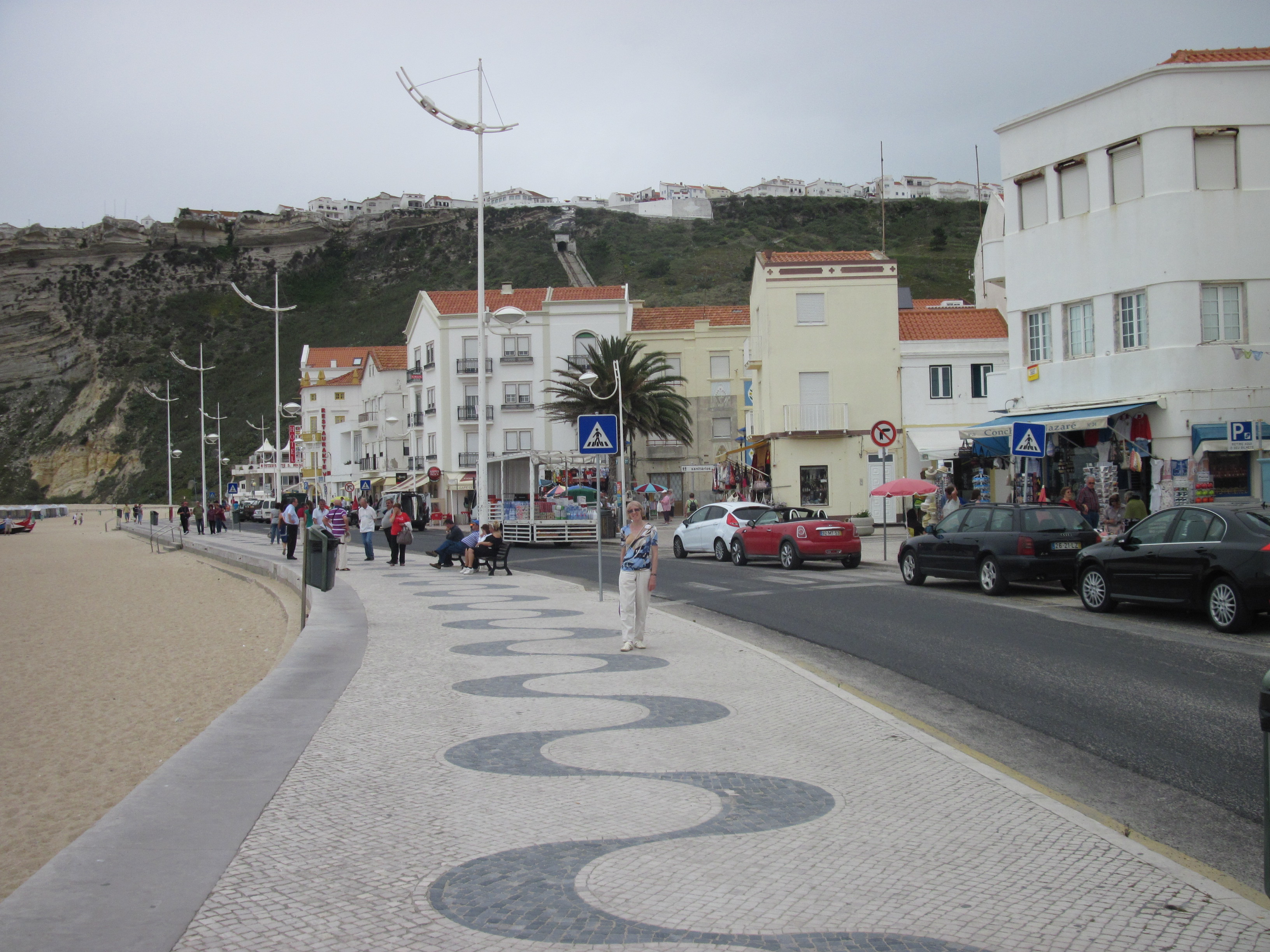 Набережная Атлантики в Назаре